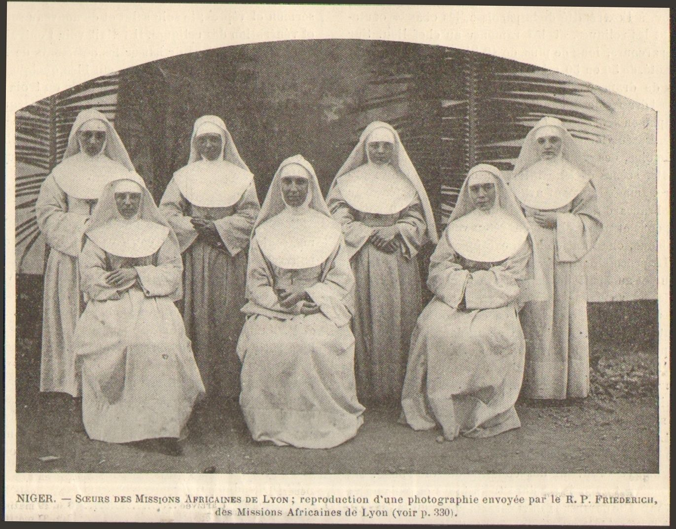 Sœurs de la Société des Missions Africaines de Lyon. Carte postale des années 1920.